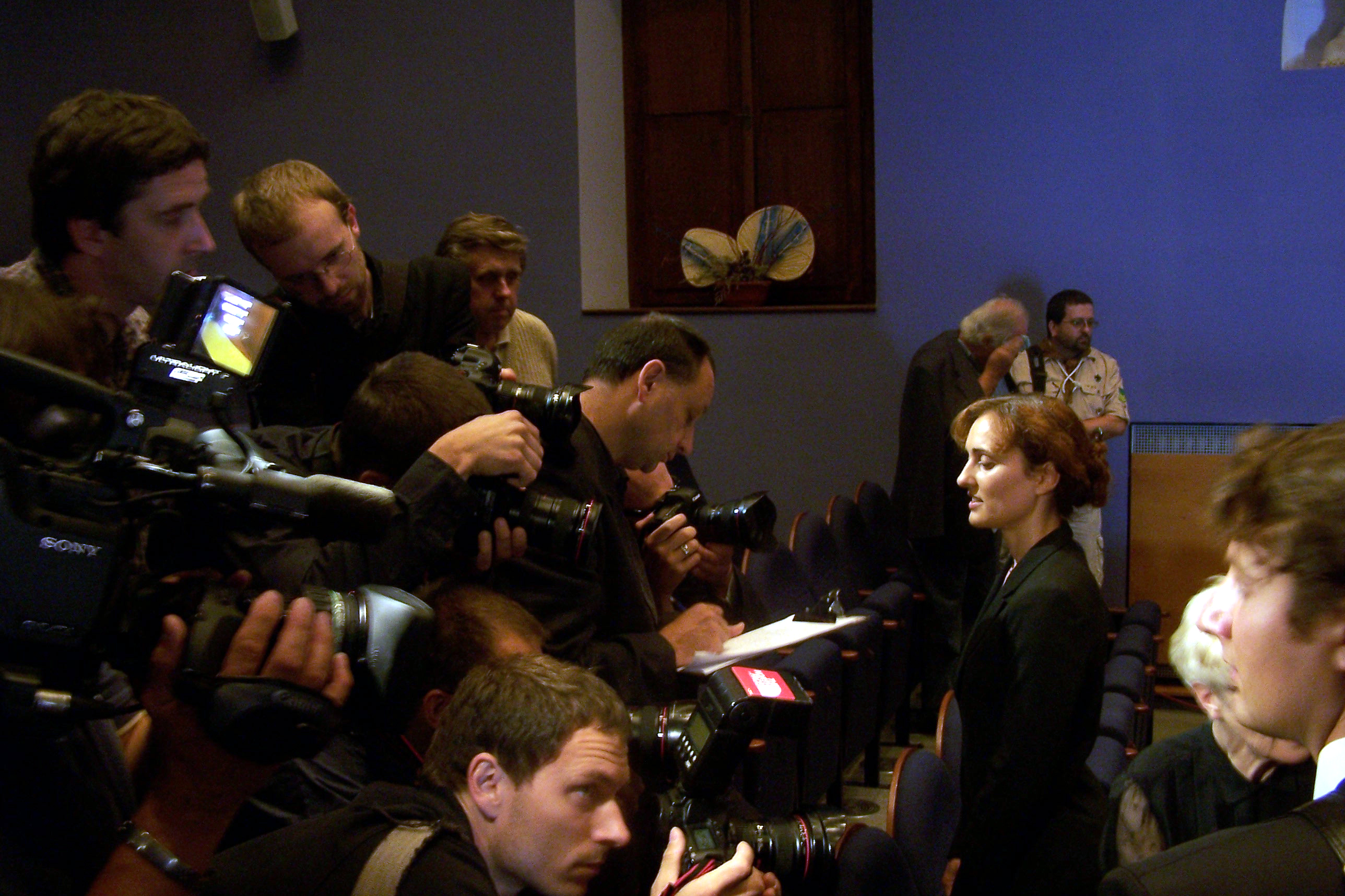 Poslední rozloučení s Milanem Paumerem, Poděbrady. Barbara Masin dává rozhovor novinářům.